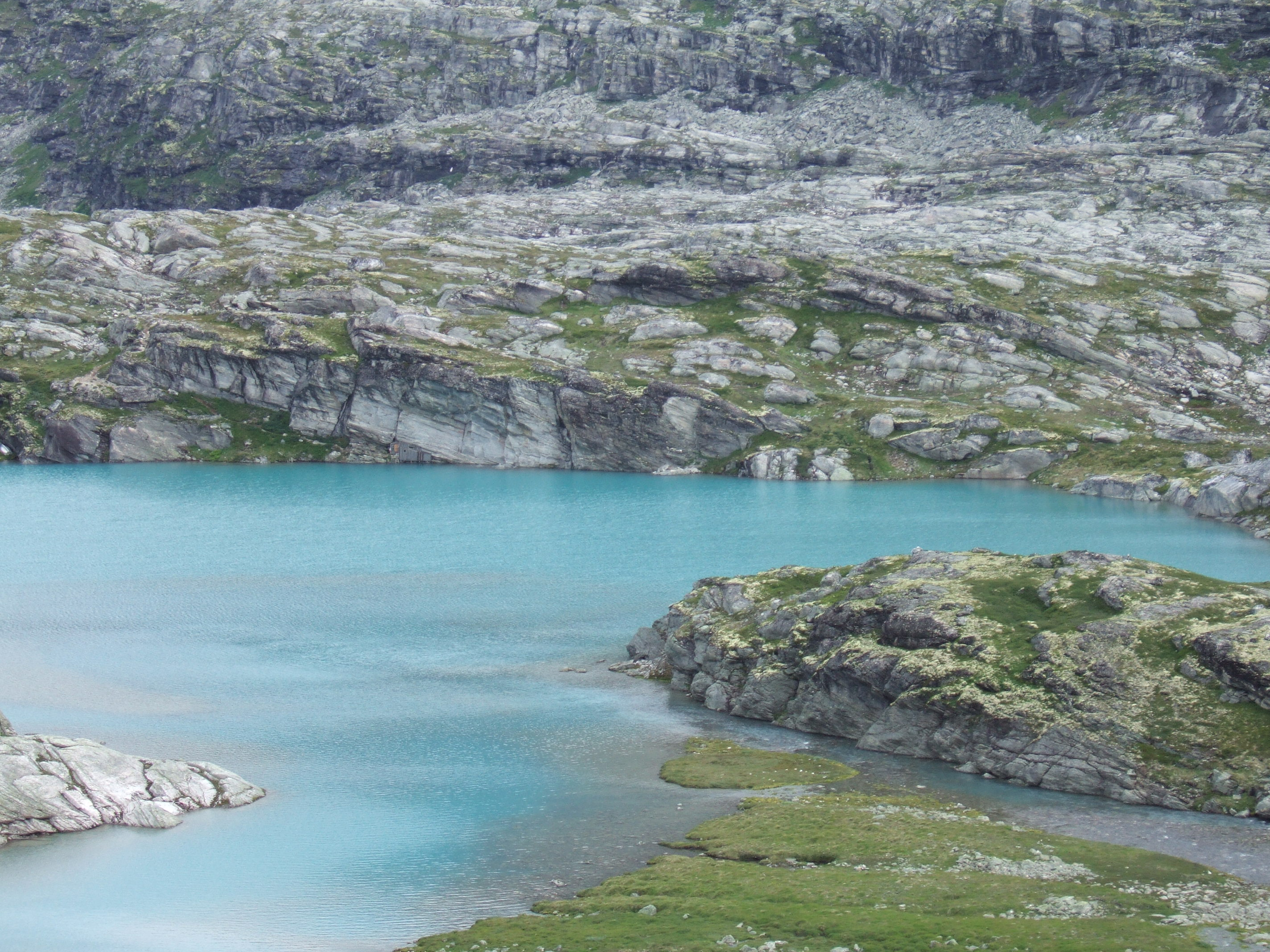 Fieldfare cabin (Fieldfarehytta) is a shelter built during the occupation of Norway by Nazi Germany. The cabin was built during the spring of 1944 by a sabotage team of the Norwegian Independent Company 1. As the picture shows it is almost impossible to see the cottage just some few hundred meters away.